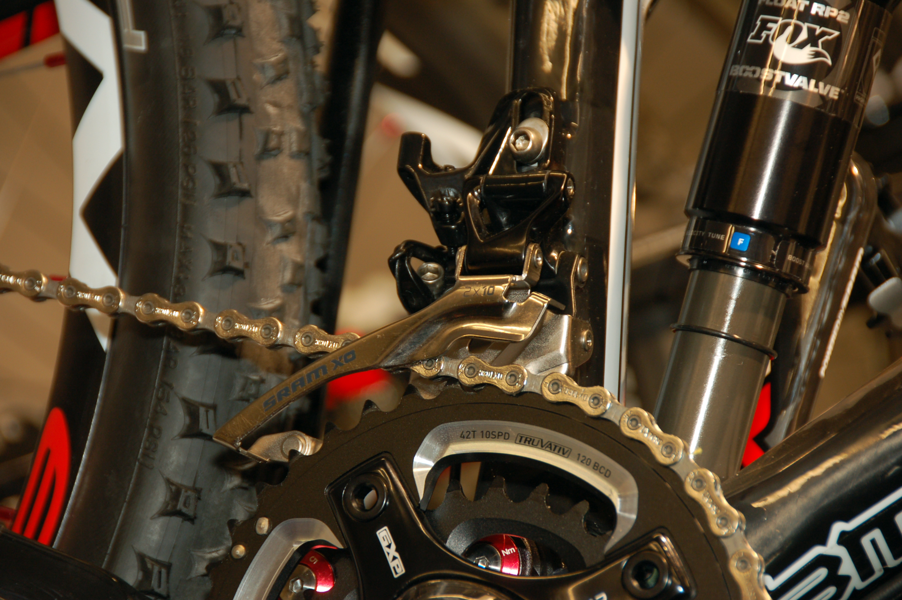 Detail Fahrradtechnik; mit freundlicher Genehmigung von - fahrradvermietung am Kurfürstendamm